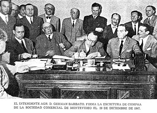 German Barbato poniendo la firma de creación de AMDET